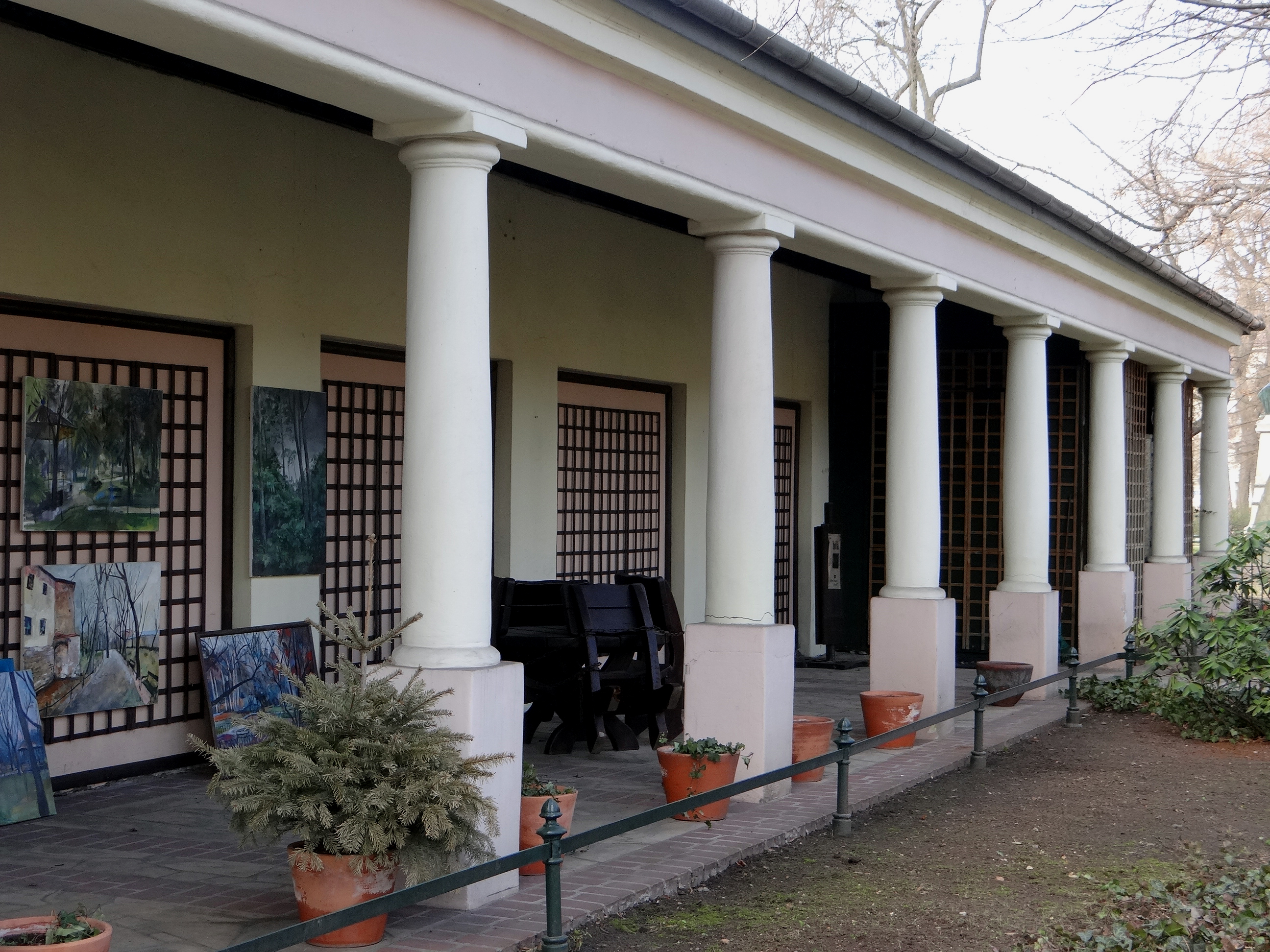 Kraków ul. św. Marka 34 Caffe Gallery Zakopianka. Kolumnada.